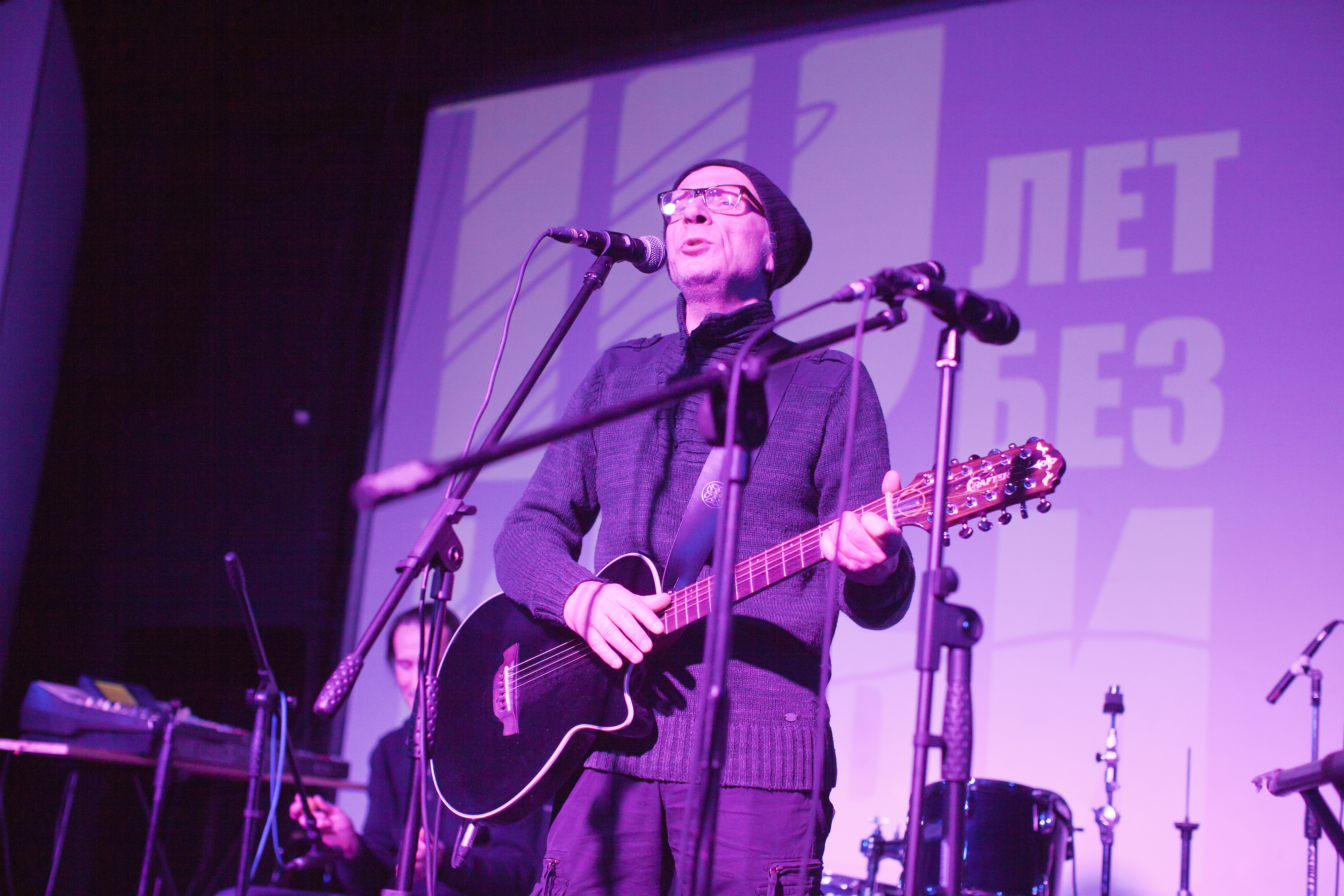 Музыкант Алексей Могилевский на концерте памяти Ильи Кормильцева